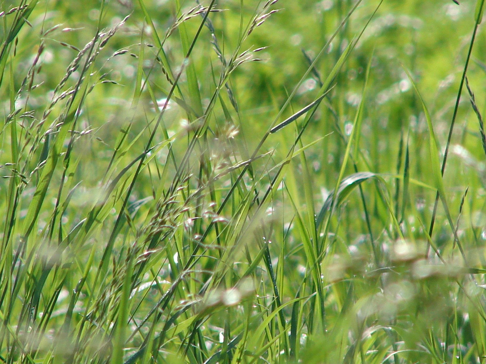 Herbal